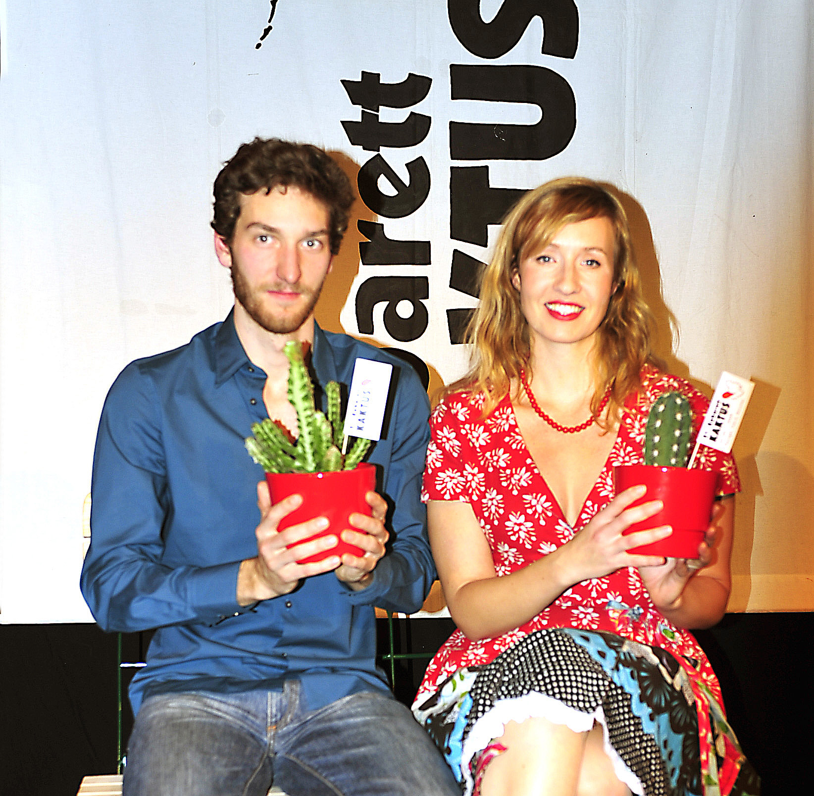 Das Geld liegt auf der Fensterbank, Mari